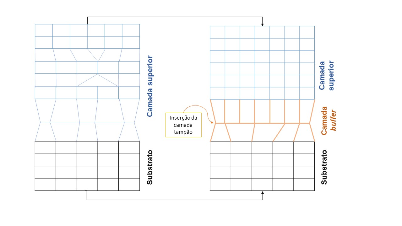 Esquema ilustrativo sobre a otimização da estrutura cristalina da camada superior depositada por técnicas de deposição de filmes finos sob um substrato pela inserção da camada tampão